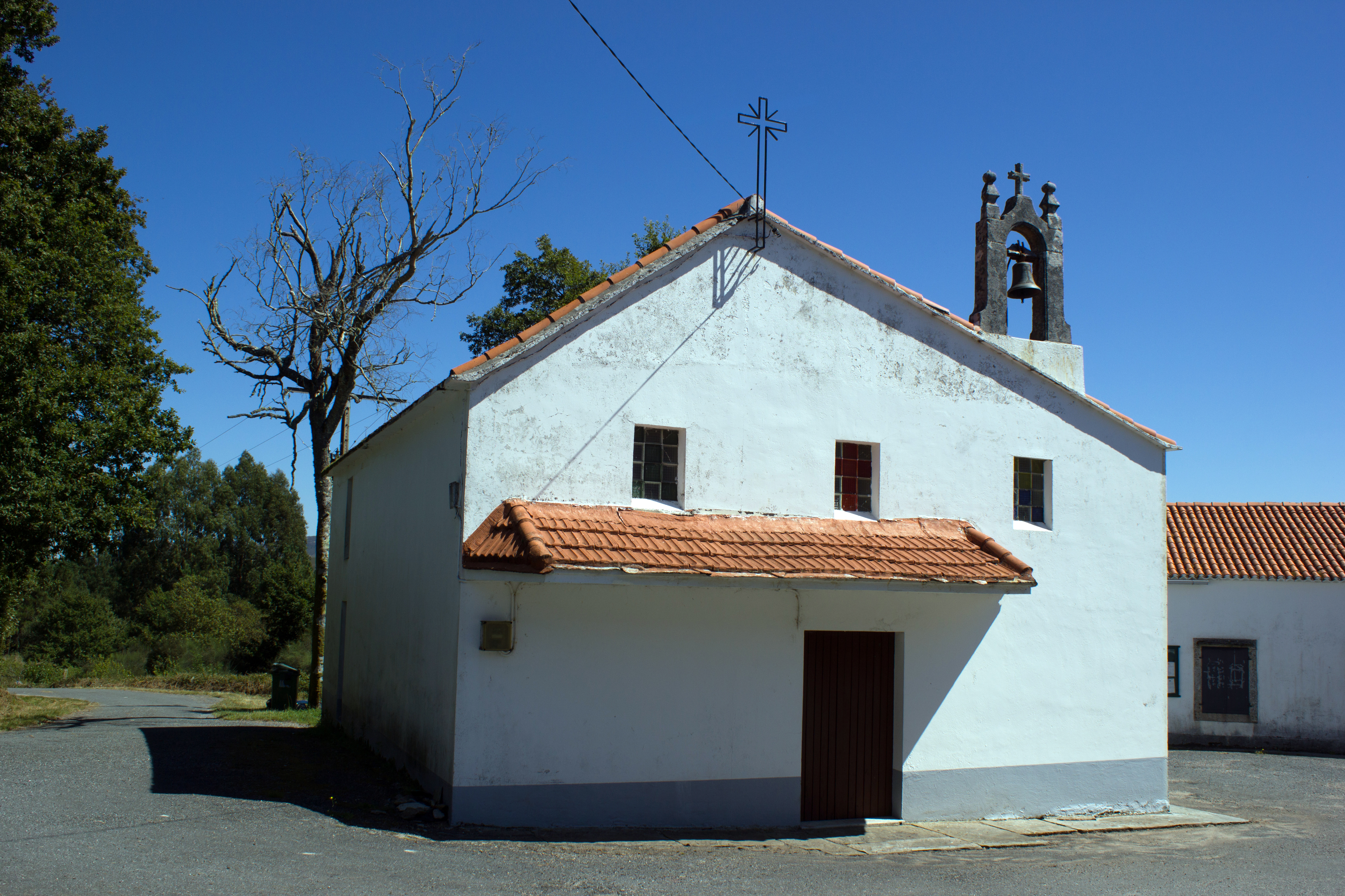 Capela dos Codesás, no concello de Forcarei.